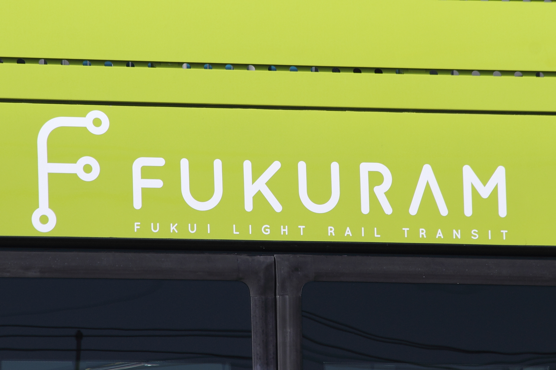 福井鉄道F1000形電車 (F1003) のロゴ。